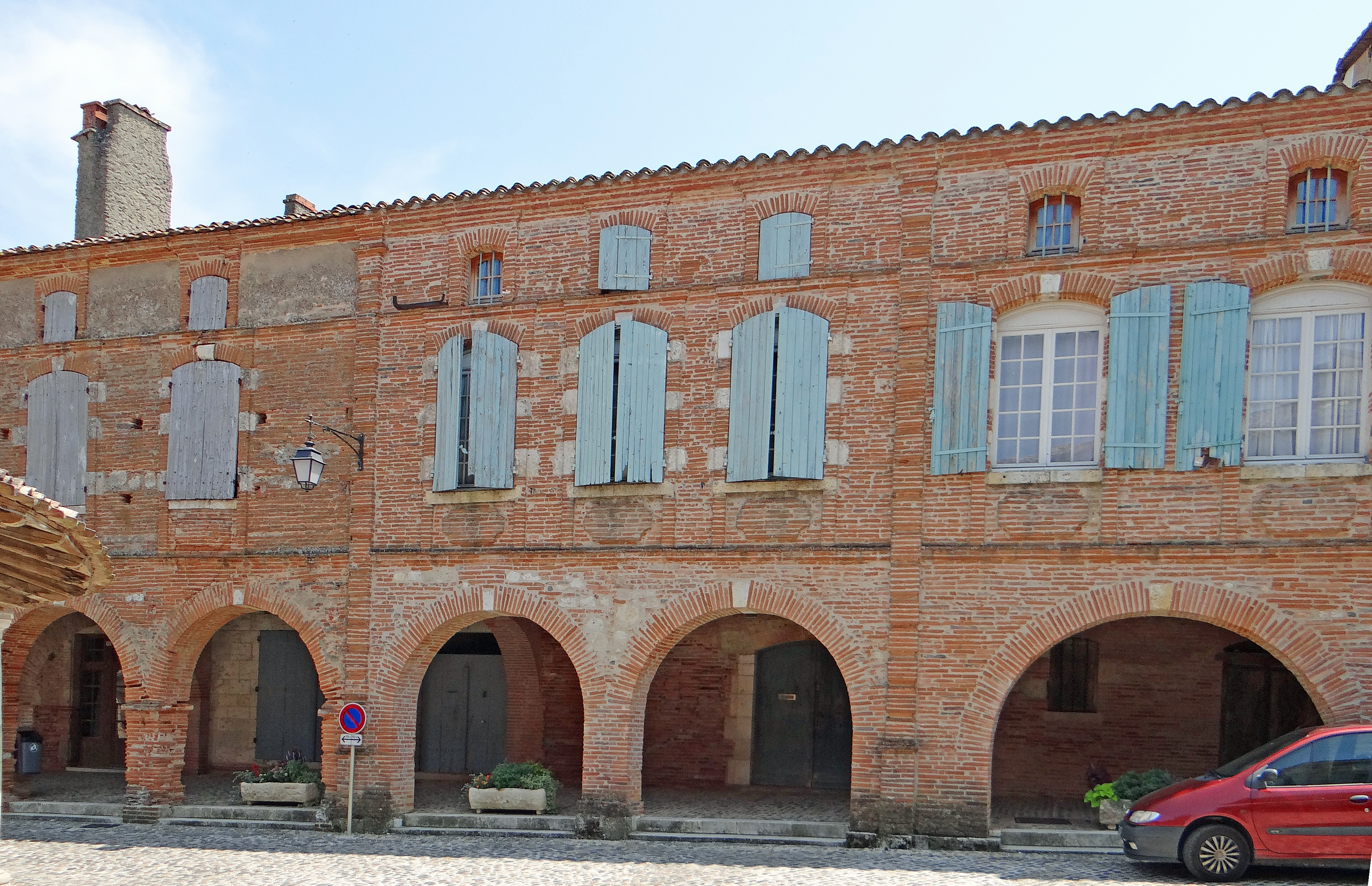 Auvillar - Place de la Halle-aux-Grains - Façade des immeubles n°15, 16, 17 et 18